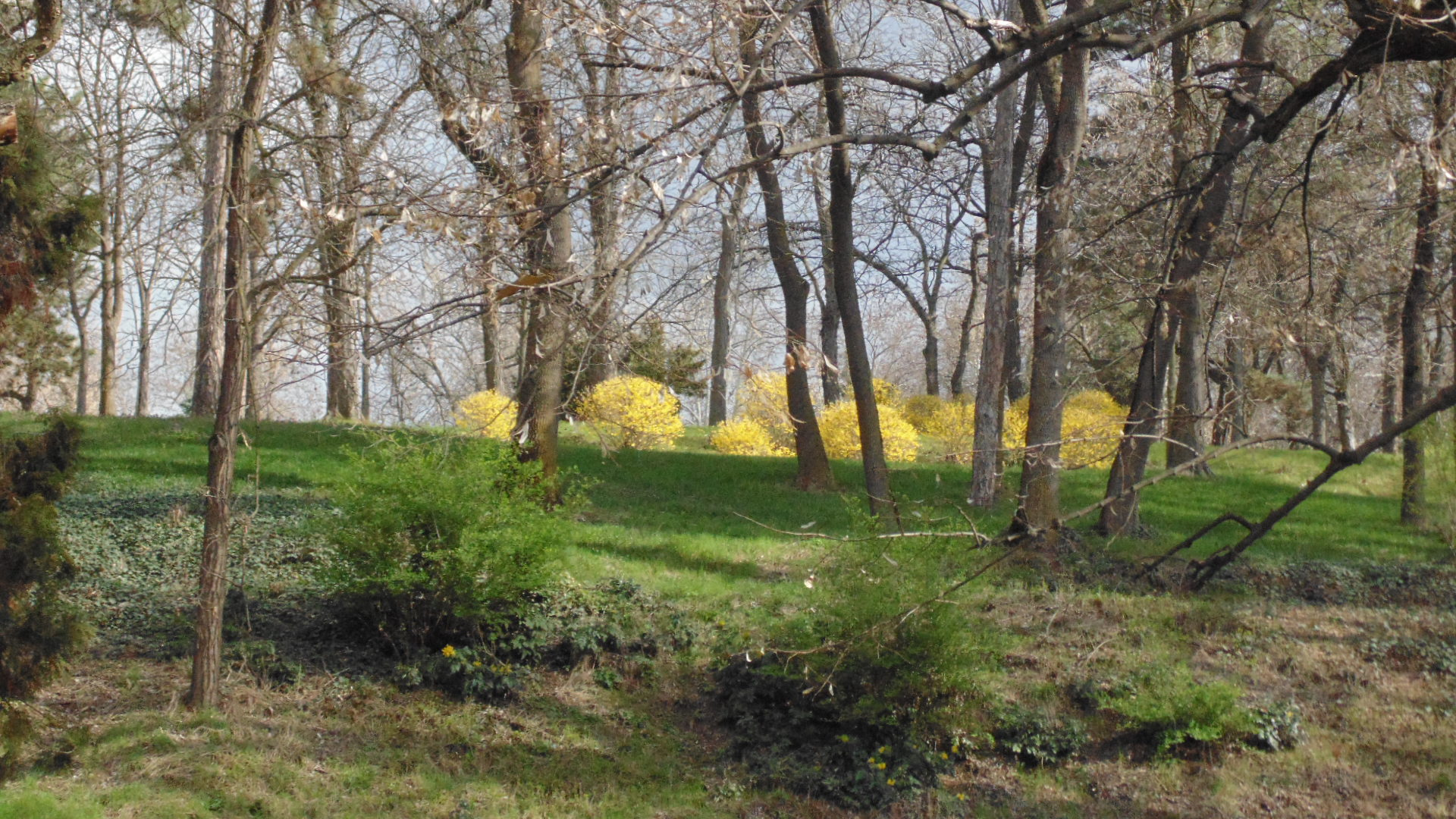 Парк край Момина баня в Хисар, в близост до защитена местност „Барикадите“